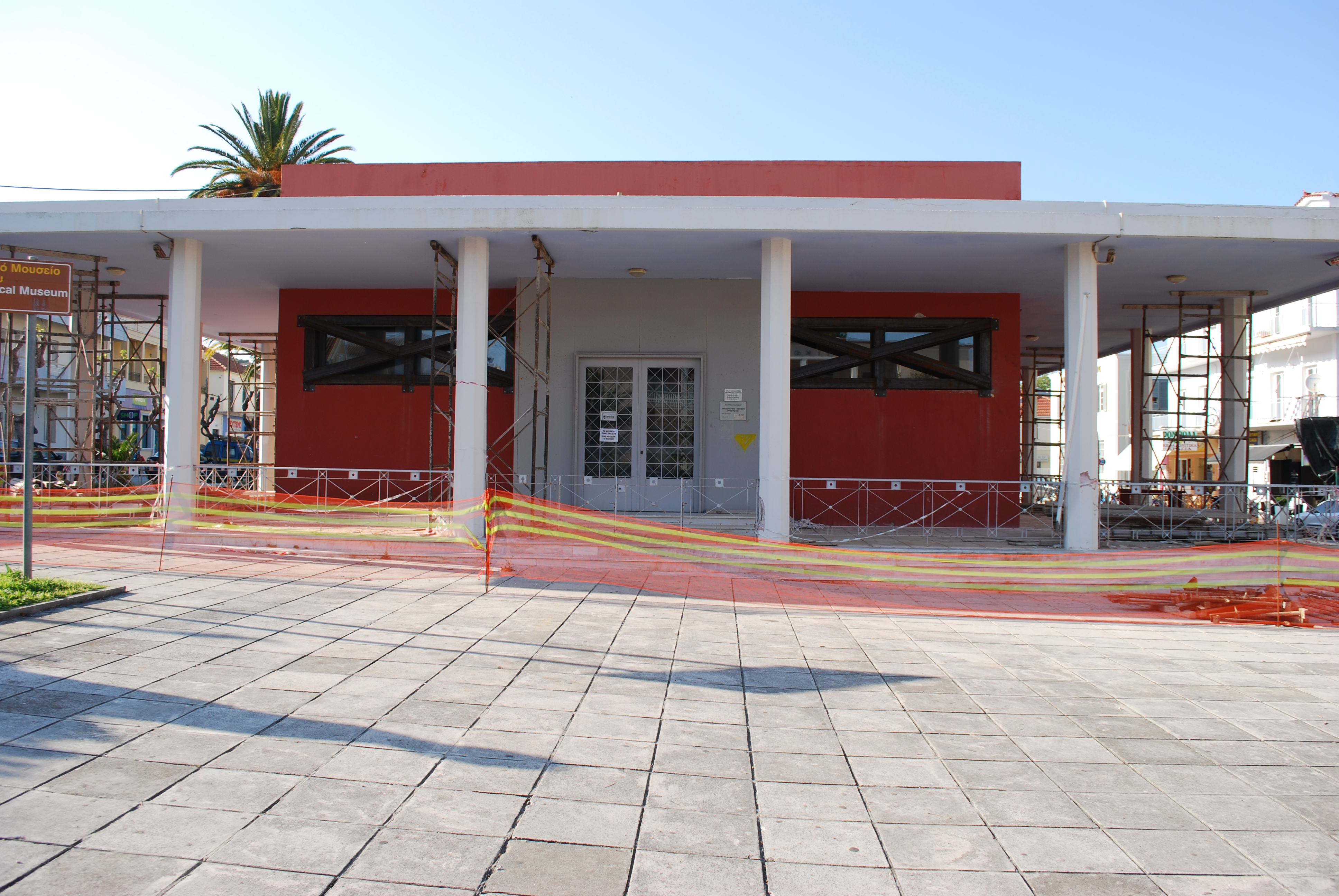 Vue d'Argostoli (Kephalonia).